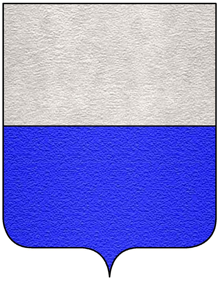 Stemma della famiglia Cacciaconti